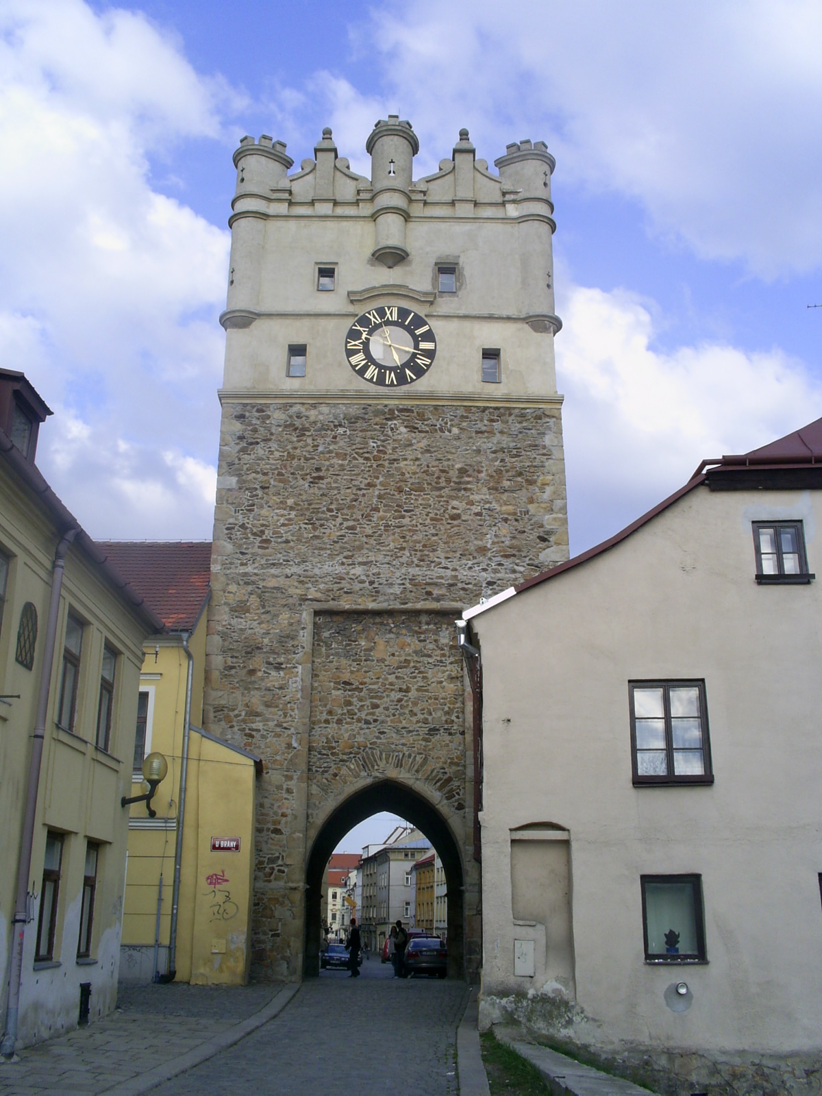 Tower of Jihlava (Jihlava-Czech Republic).